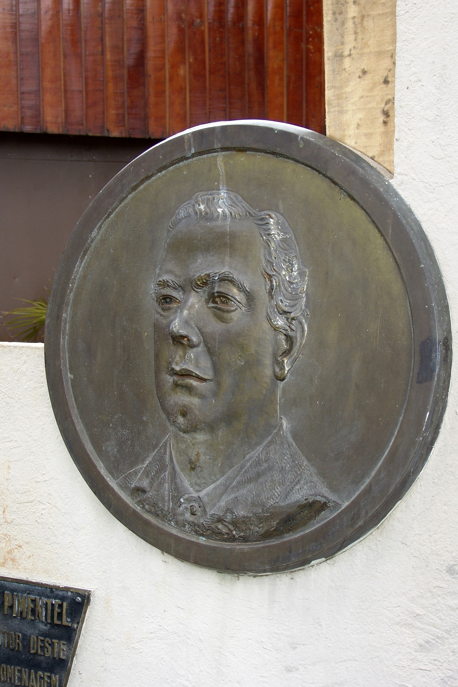 Placa comemorativa imagem do ex-prefeito de Avaré Fernando Pimentel, localizada na EMAPA, Avaré, São Paulo, Brasil